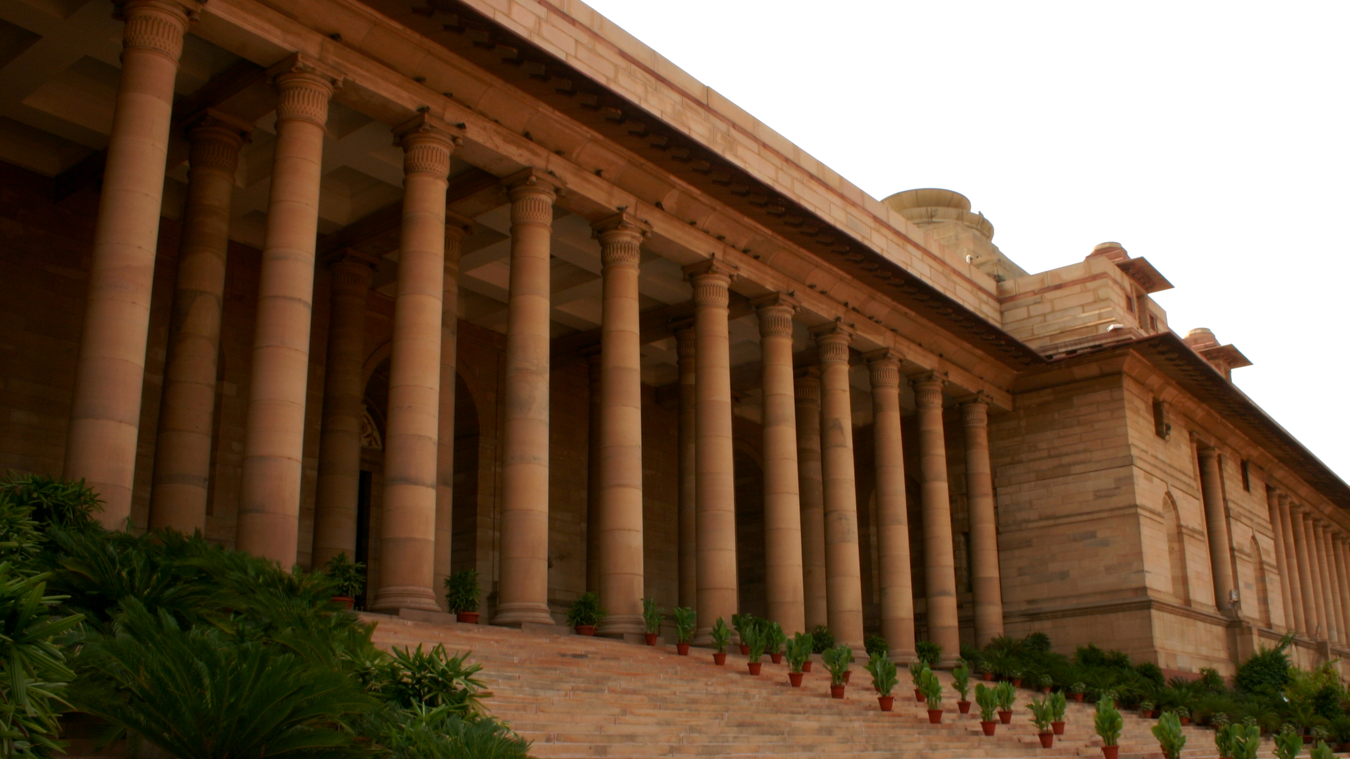 Rashtrapati Bhavan, India